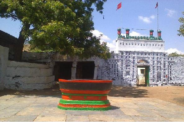 దర్గాలో కిస్తీ దోణె